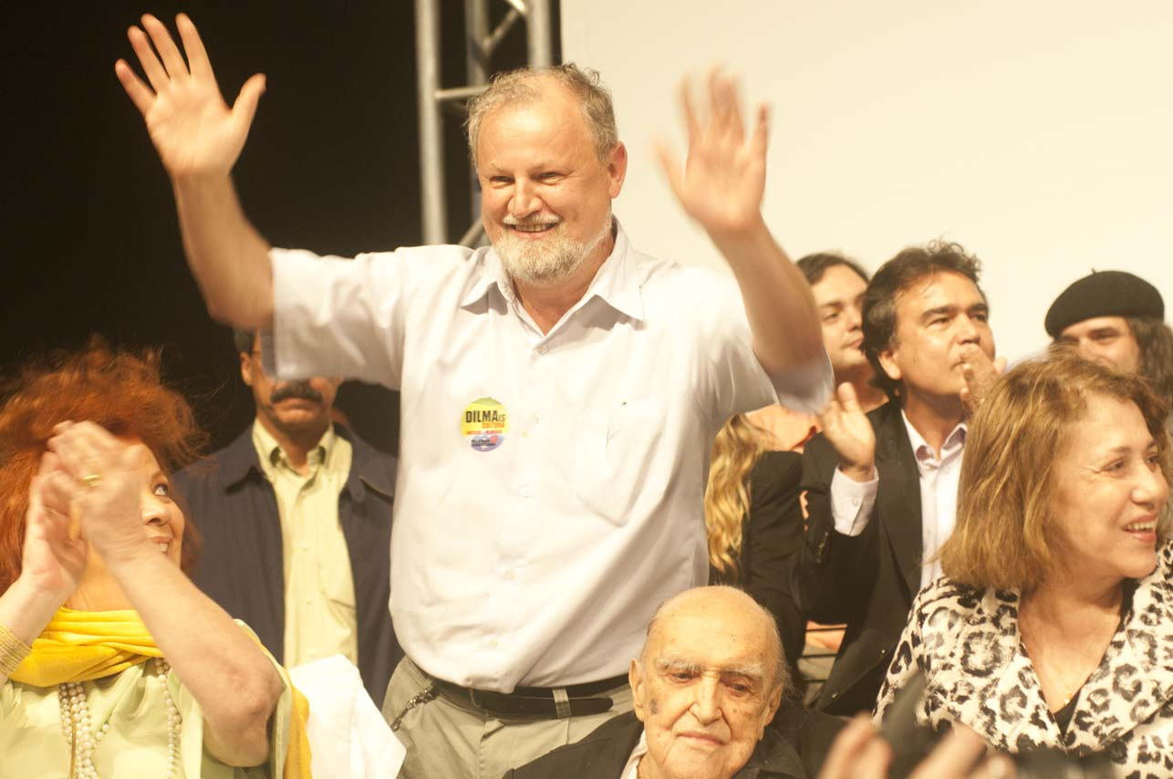 Fotos Ivone Perez - Evento Pró Dilma Teatro - Casa Grande - Rio de Janeiro 18/10/10.João Pedro Stédile